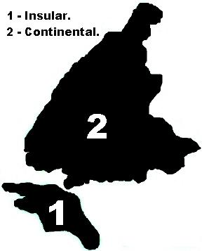 Santos Map